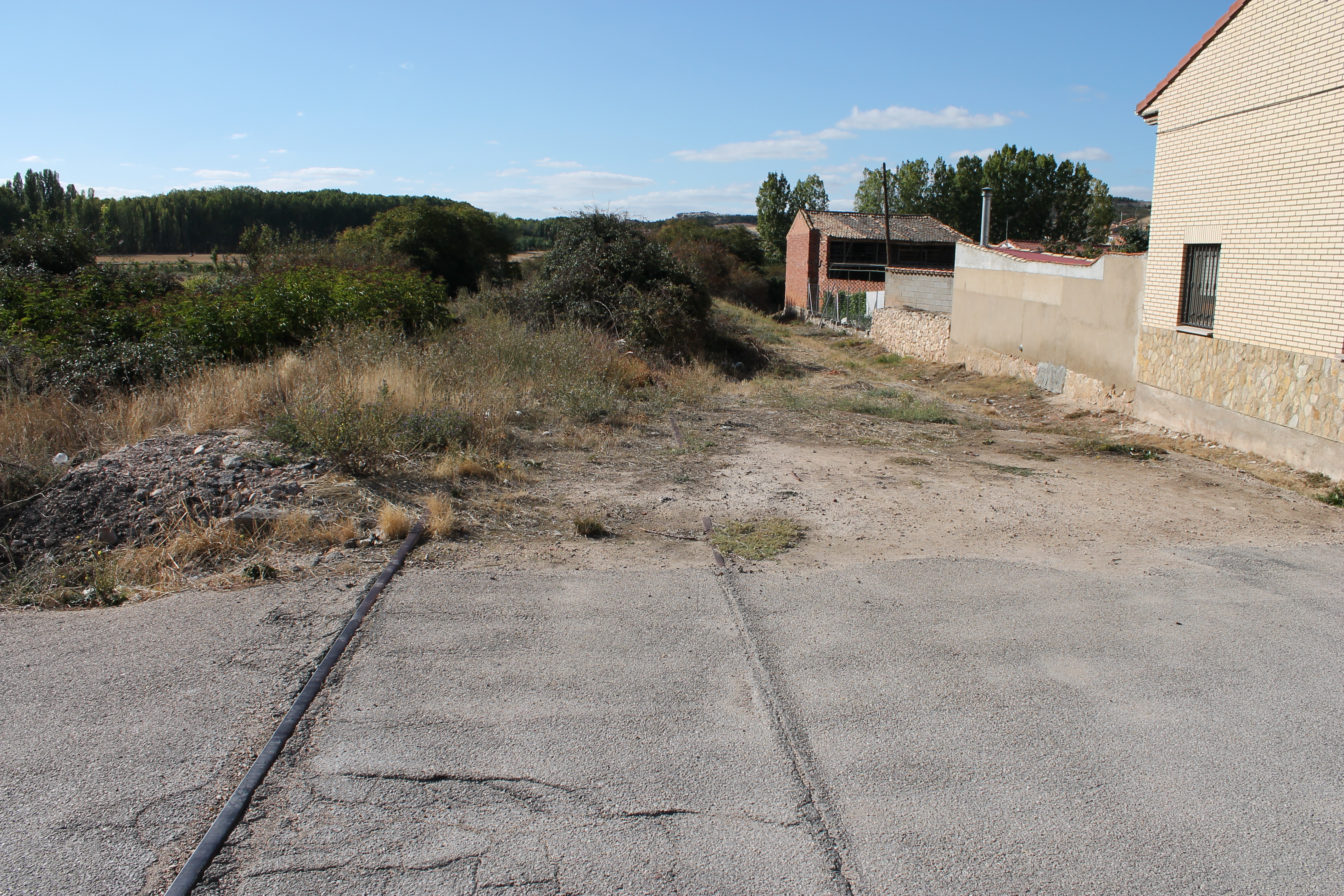 Langa de Duero